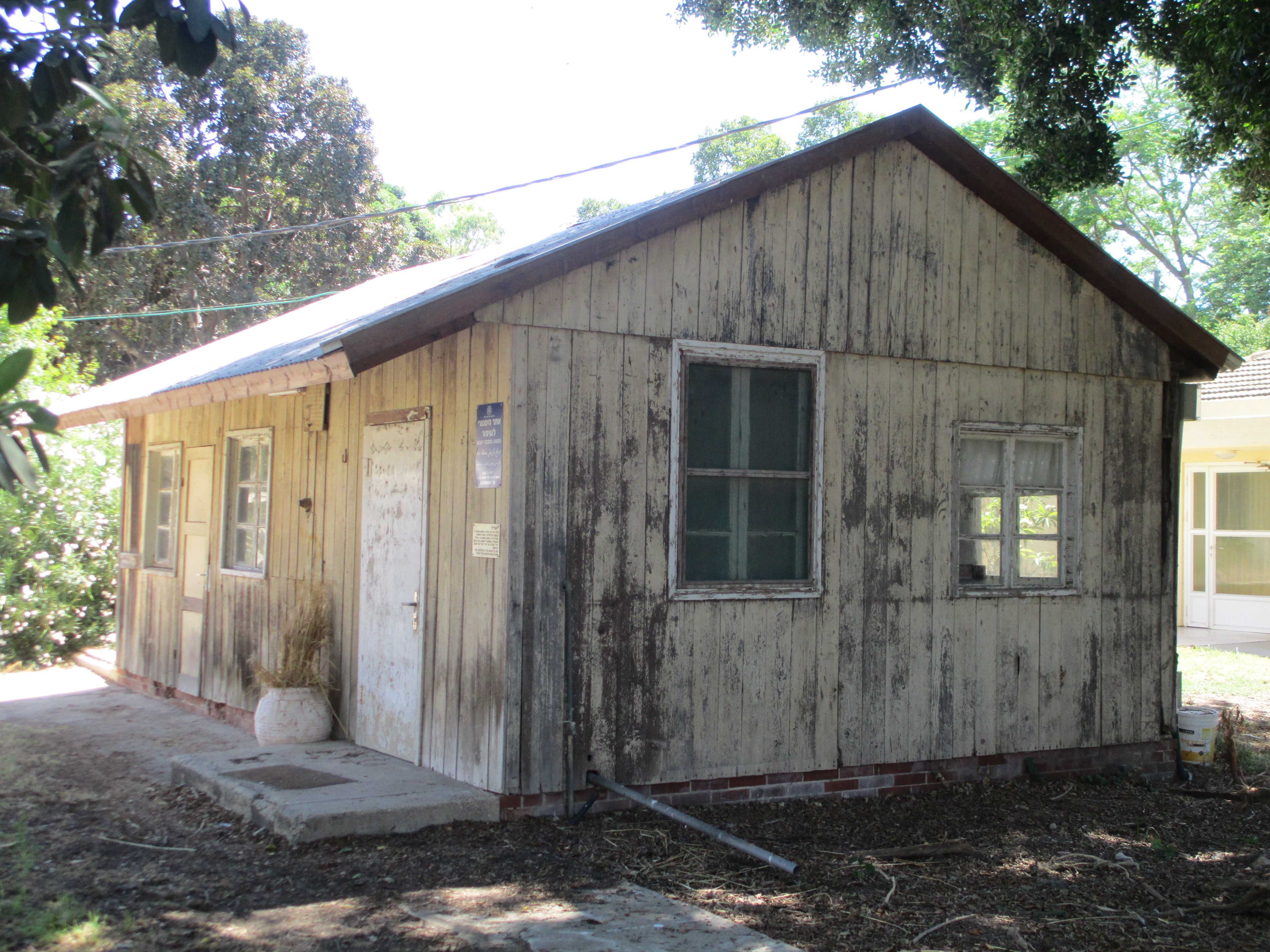 הצריף הראשון בכפר מסריק